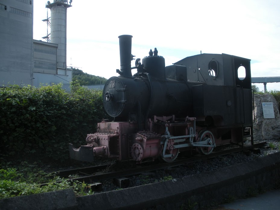 Schmalspur-Dampflokomotive Nr. 78 in Oberrödinghausen auf dem Rheinkalkgelände Hersteller: Berliner Maschinenfabrik vorm. Louis Schwarzkopff Fabrikations-Nr. 10695 Baujahr 1937 Leistung 75 PS Dienstgewicht 7,5 t Spurweite 750 mm Diese Maschine war im Werk Hönnetal der „Rheinisch-Westfälischen-Kalkwerke AG“ bis 1969 im Dienst. Sie zeichnete sich durch gute Anzugskraft, Schnelligkeit und Flexibilität. Sie wurde für den innerbetrieblichen Transport verwendet.